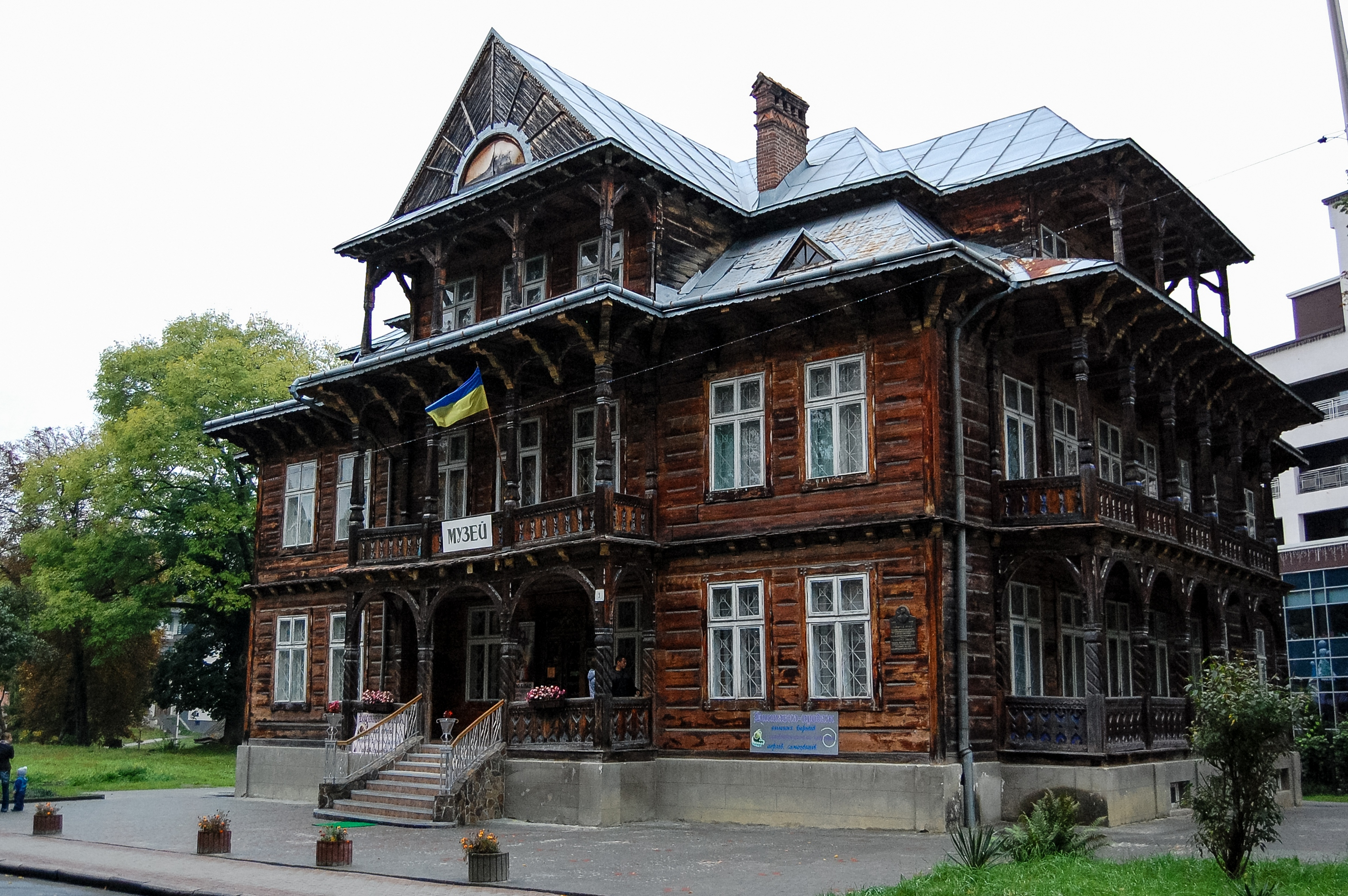 Вілла «Гопляна» (зміш.), Трускавець, майдан Кобзаря, 3